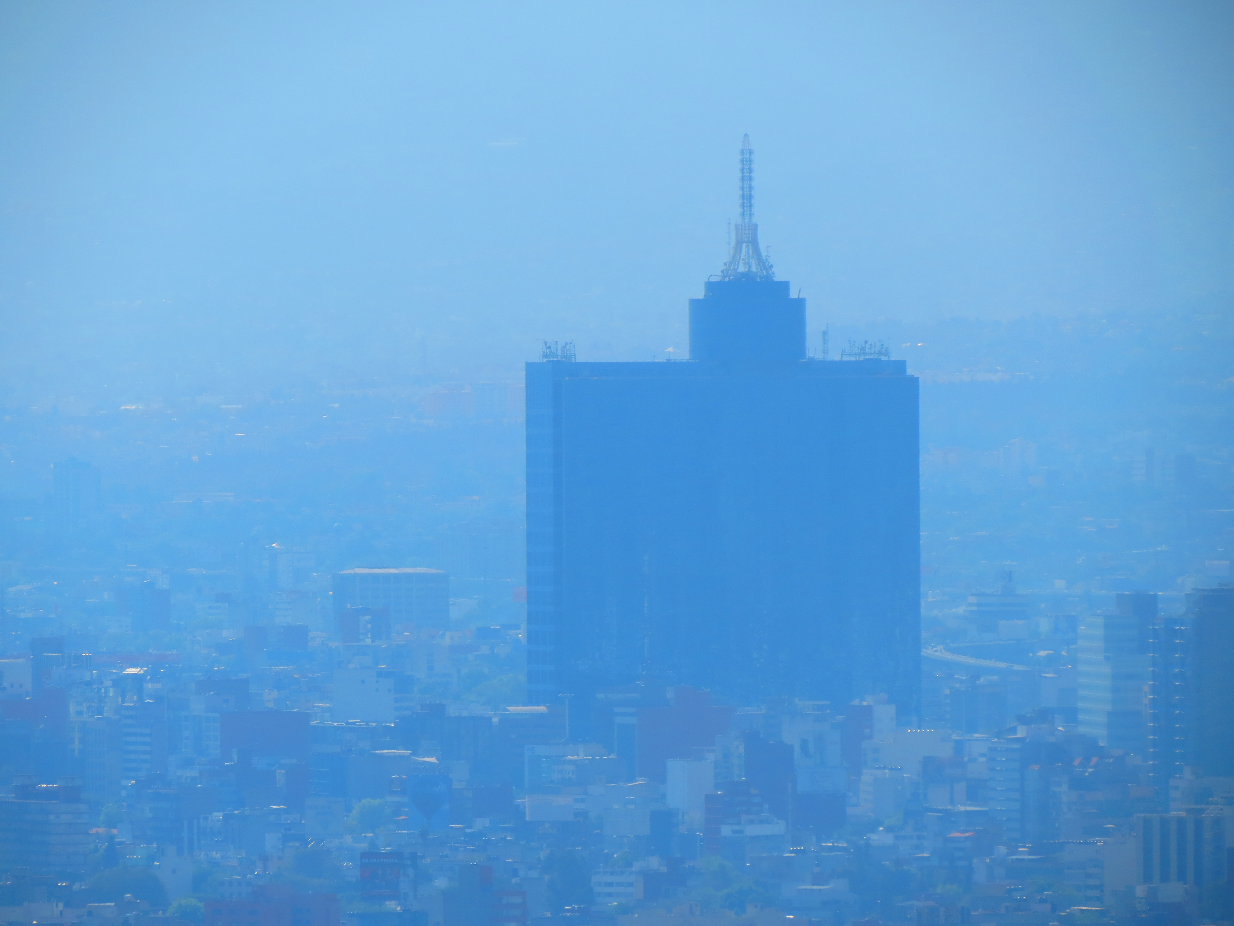 Vista de edificios desde la Torre Latinoamericana de la Ciudad de México